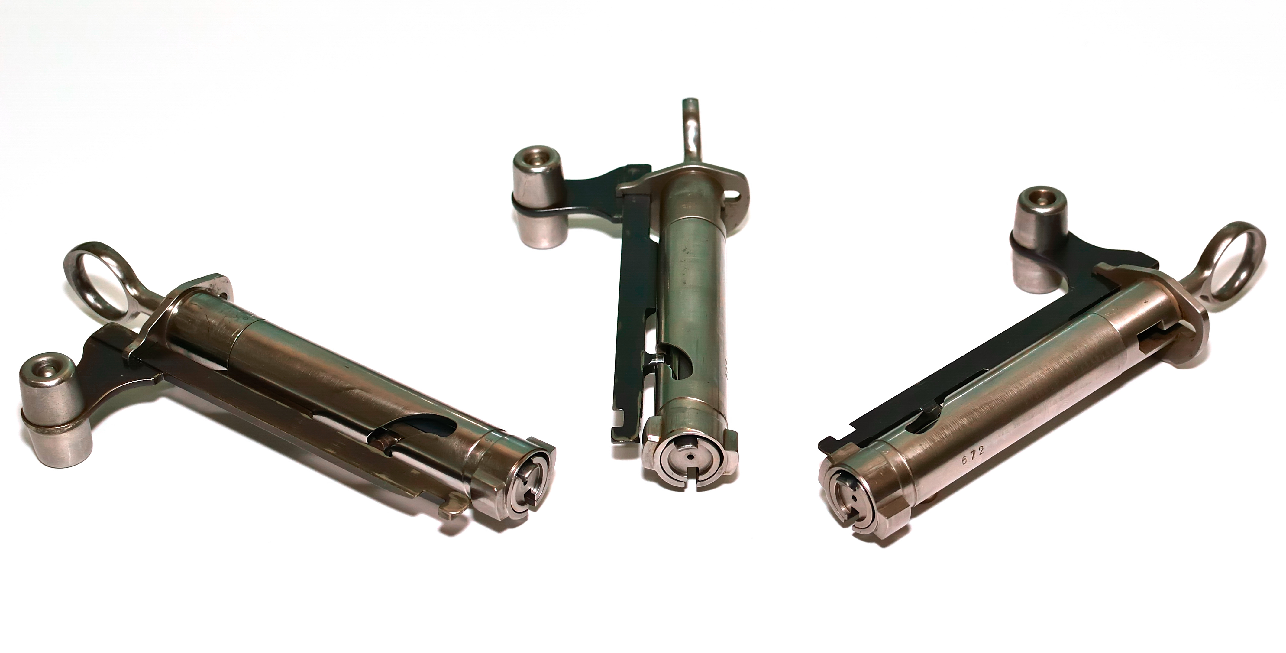 Culasse du mousqueton 1931 (S/N masqué par l'auteur)